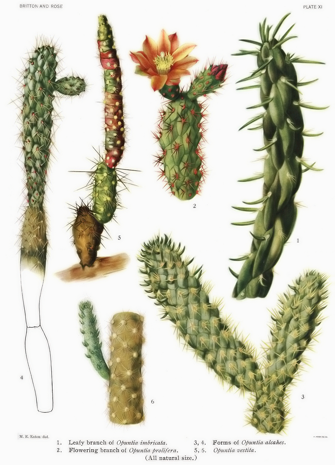 1. Cylindropuntia imbricata, 2. Cylindropuntia prolifera, 3, 4. Cylindropuntia alcahes, 5, 6. Austrocylindropuntia vestita.